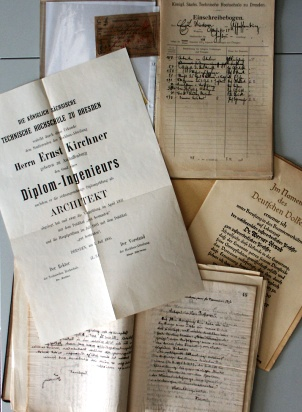 Archivalien und Dokumente aus Nachlässen und Studentenakten vor 1945